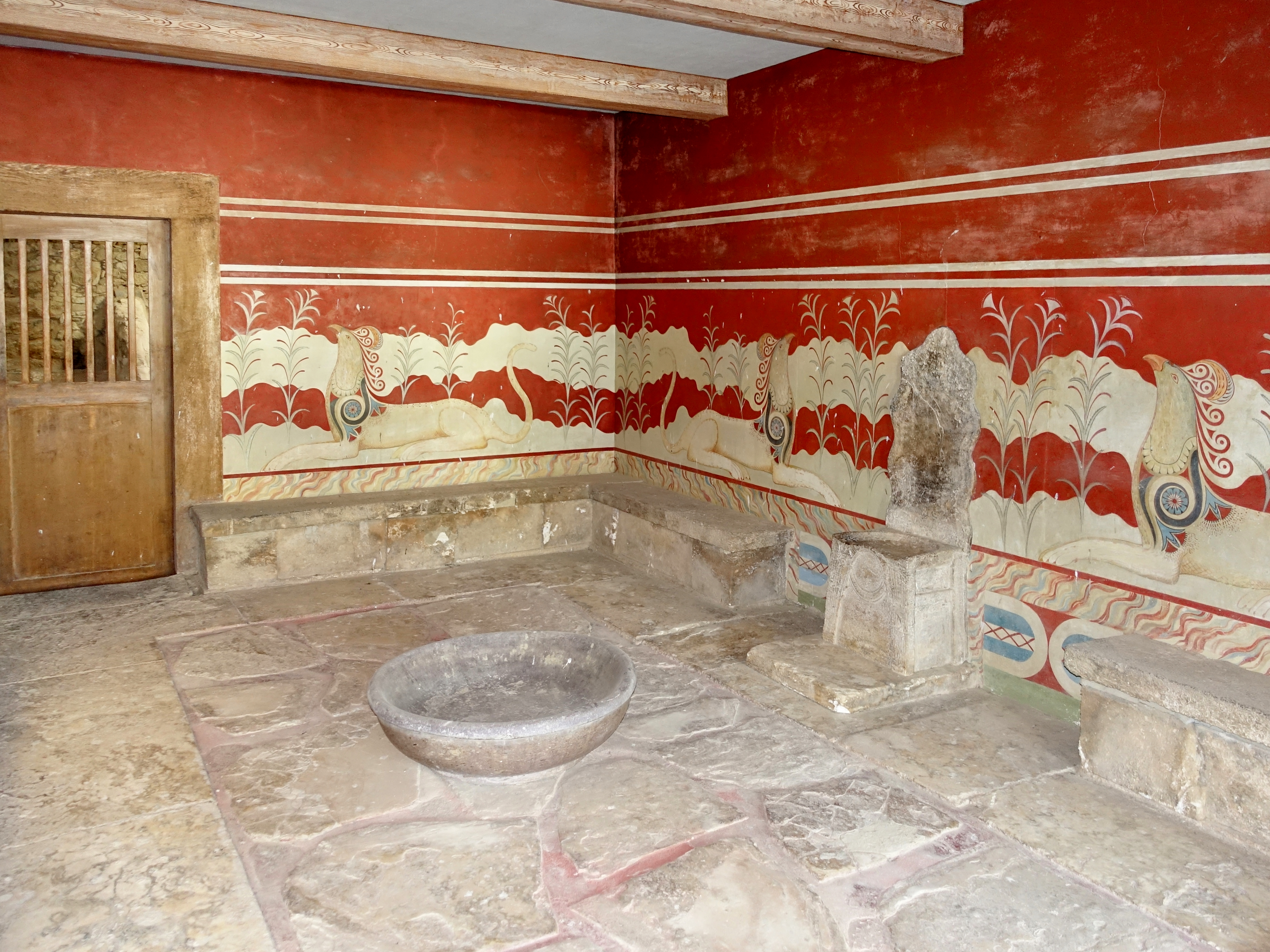 Am 13. April 1900 bei Ausgrabungen entdeckter „Thronsaal“ von Knossos (Κνωσός) südlich von Iraklio, Kreta, Griechenland